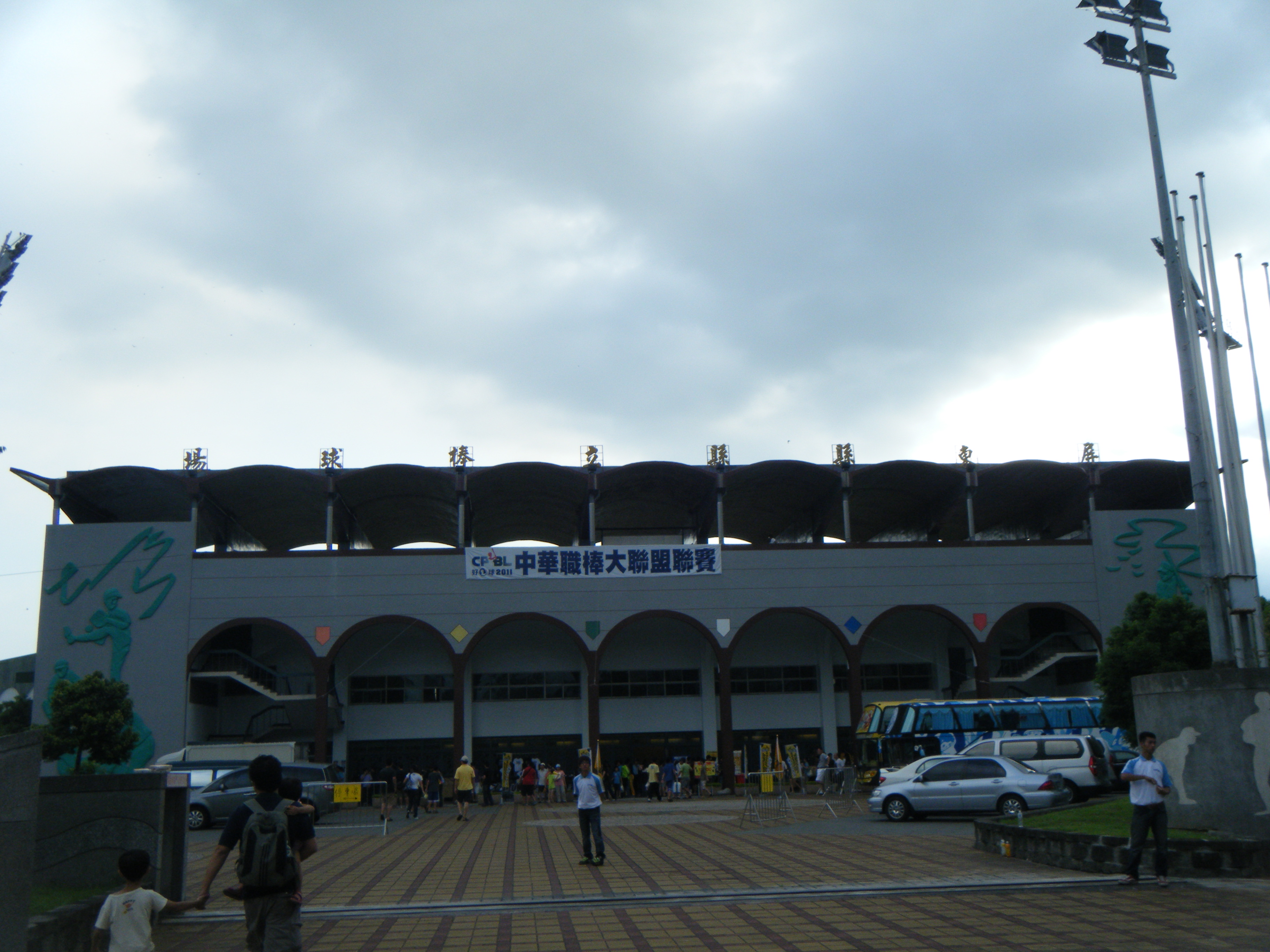 中文（台灣）: 屏東棒球場。